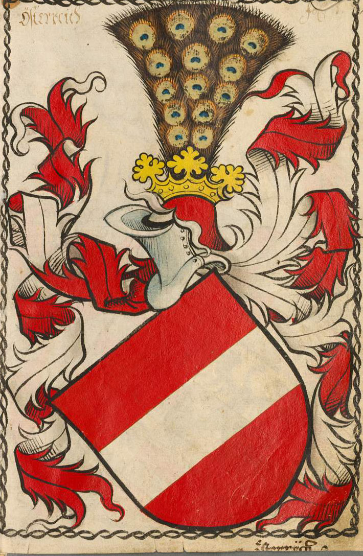 Scheibler'sches Wappenbuch , älterer Teil Österreich